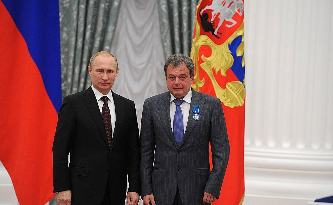 Орденом Почёта награждён председатель совета директоров строительной компании «СУ-155» Михаил Балакин